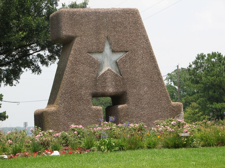 Monument symbole d'Atascocita, Texas